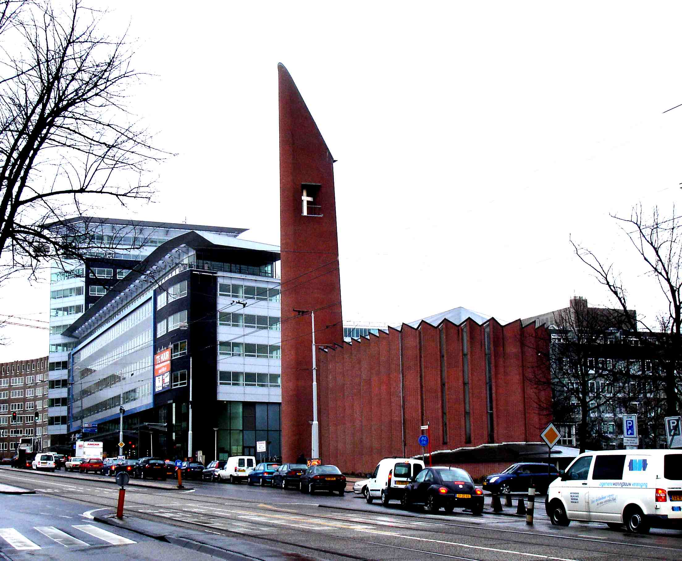 Opstandingskerk (De Kolenkit) (1956) van Marius Duintjer aan de Bos en Lommerweg in Amsterdam